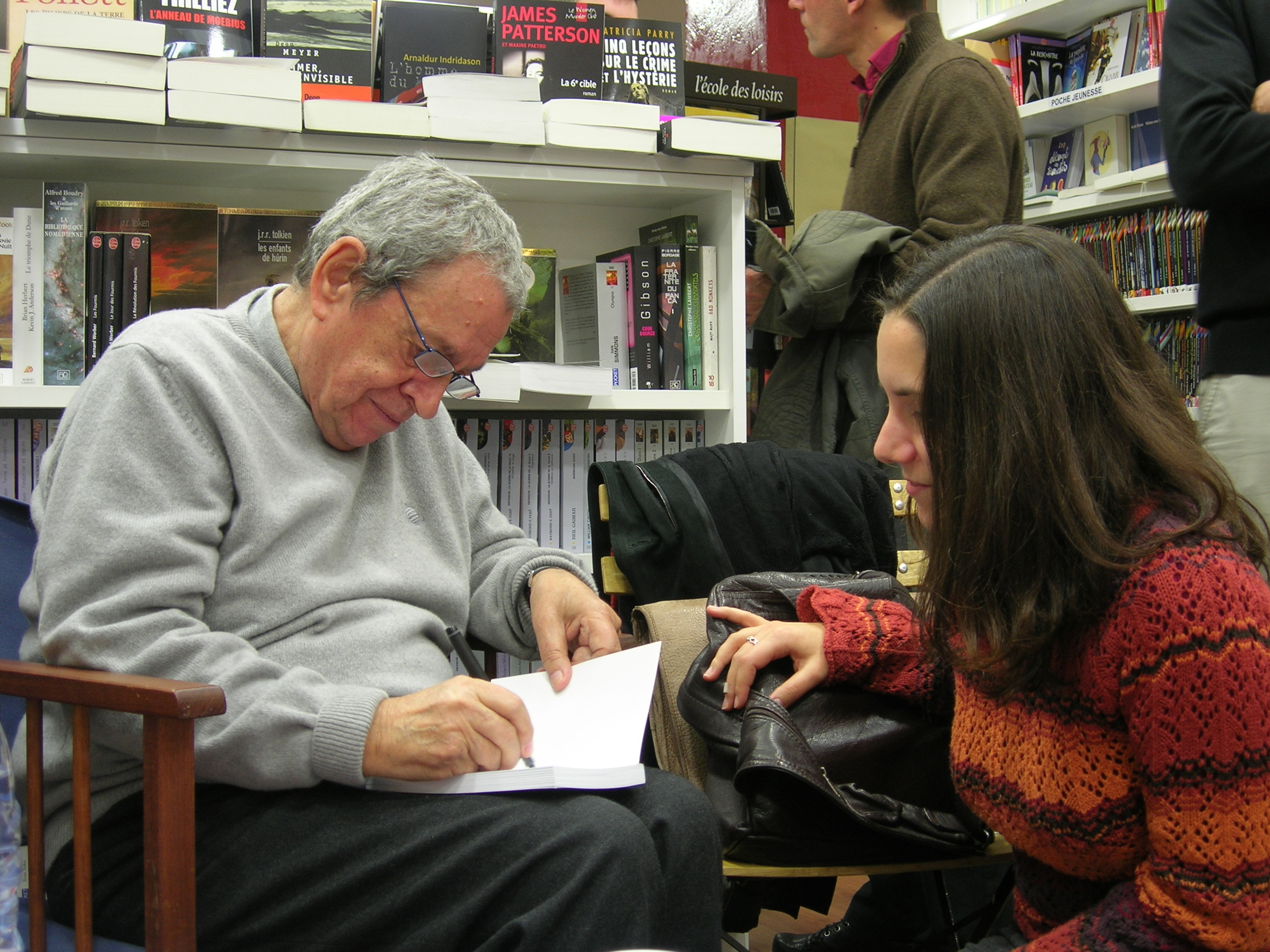 Alberto Ongaro firma autografi in una libreria francese